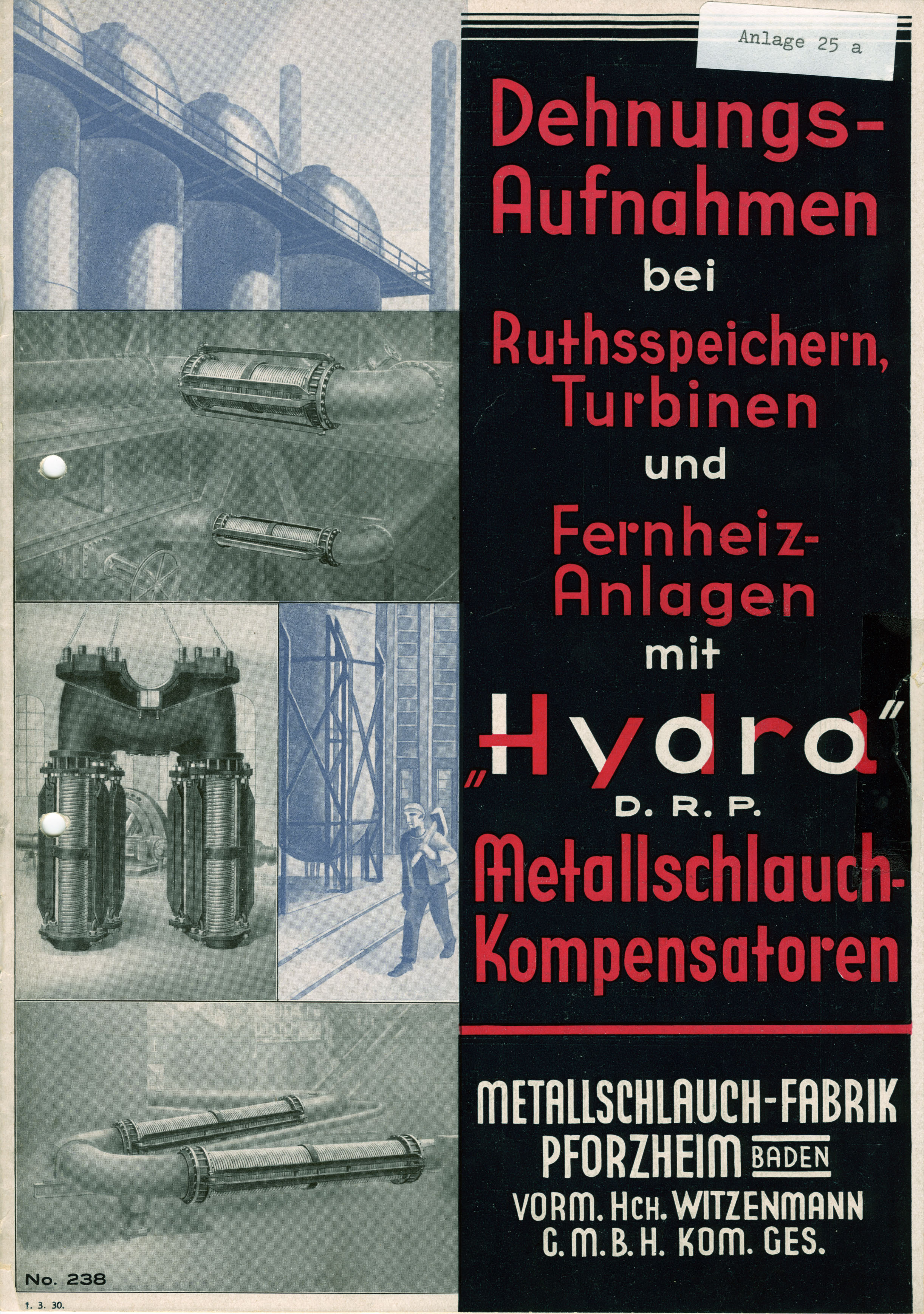 Prospekt für Kompensatoren von 1930